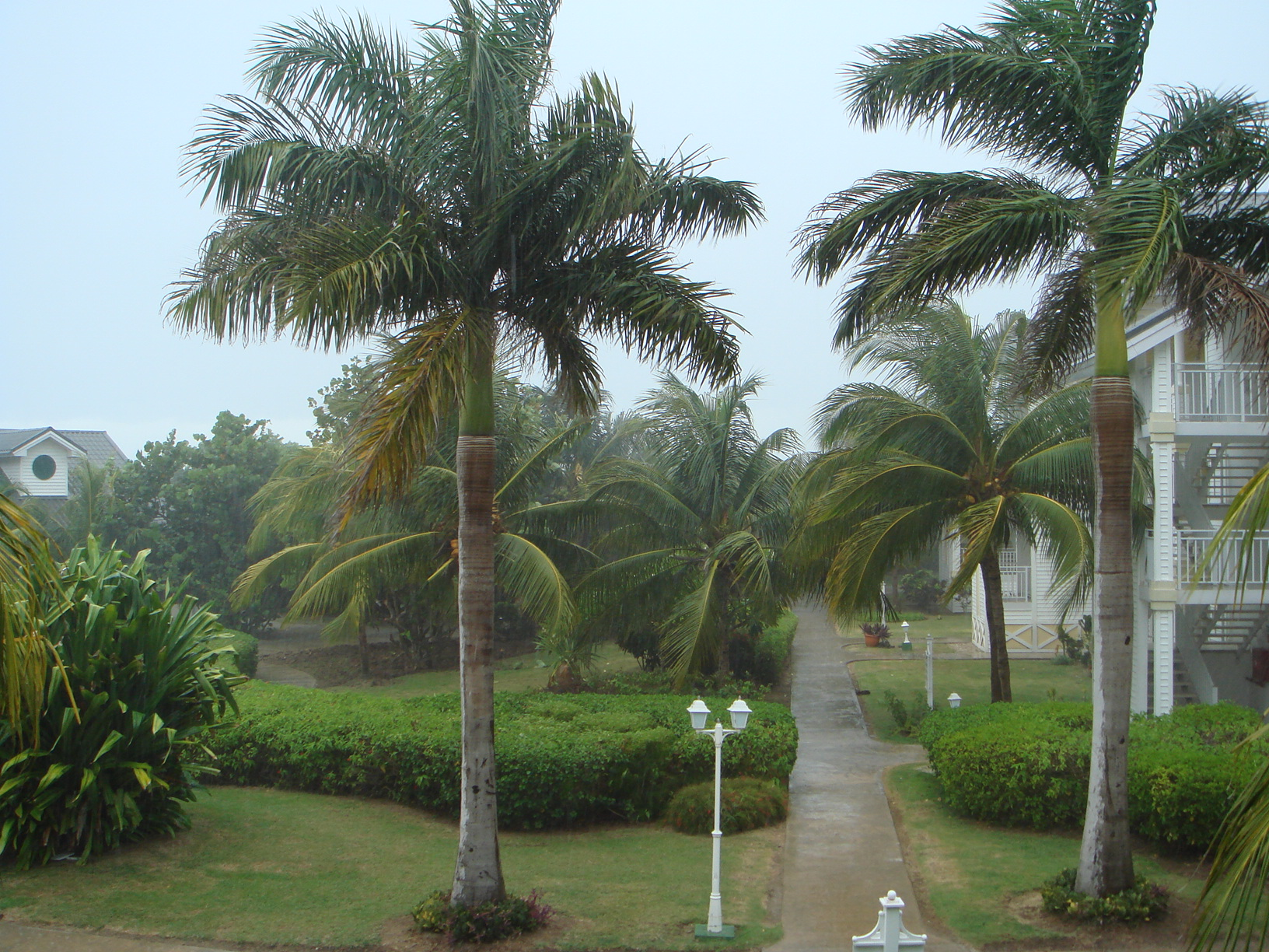 Palma real (Roystonea regia), Varadero, Cuba